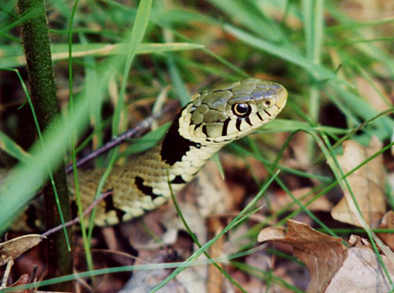 Natrix natrix Couleuvre à collier Photo prise en mai 2001 à La Celles Les Bordes dans les Yvelines